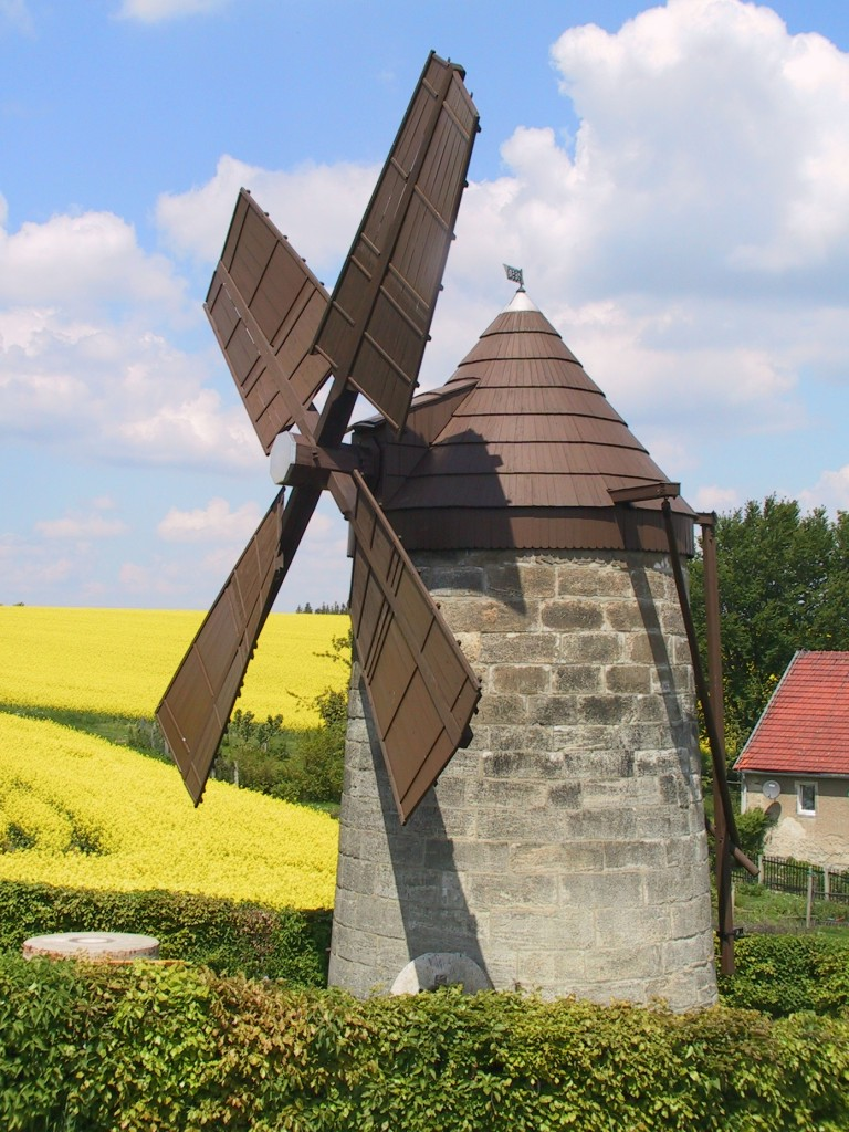 Holländerwindmühle in Reichstädt